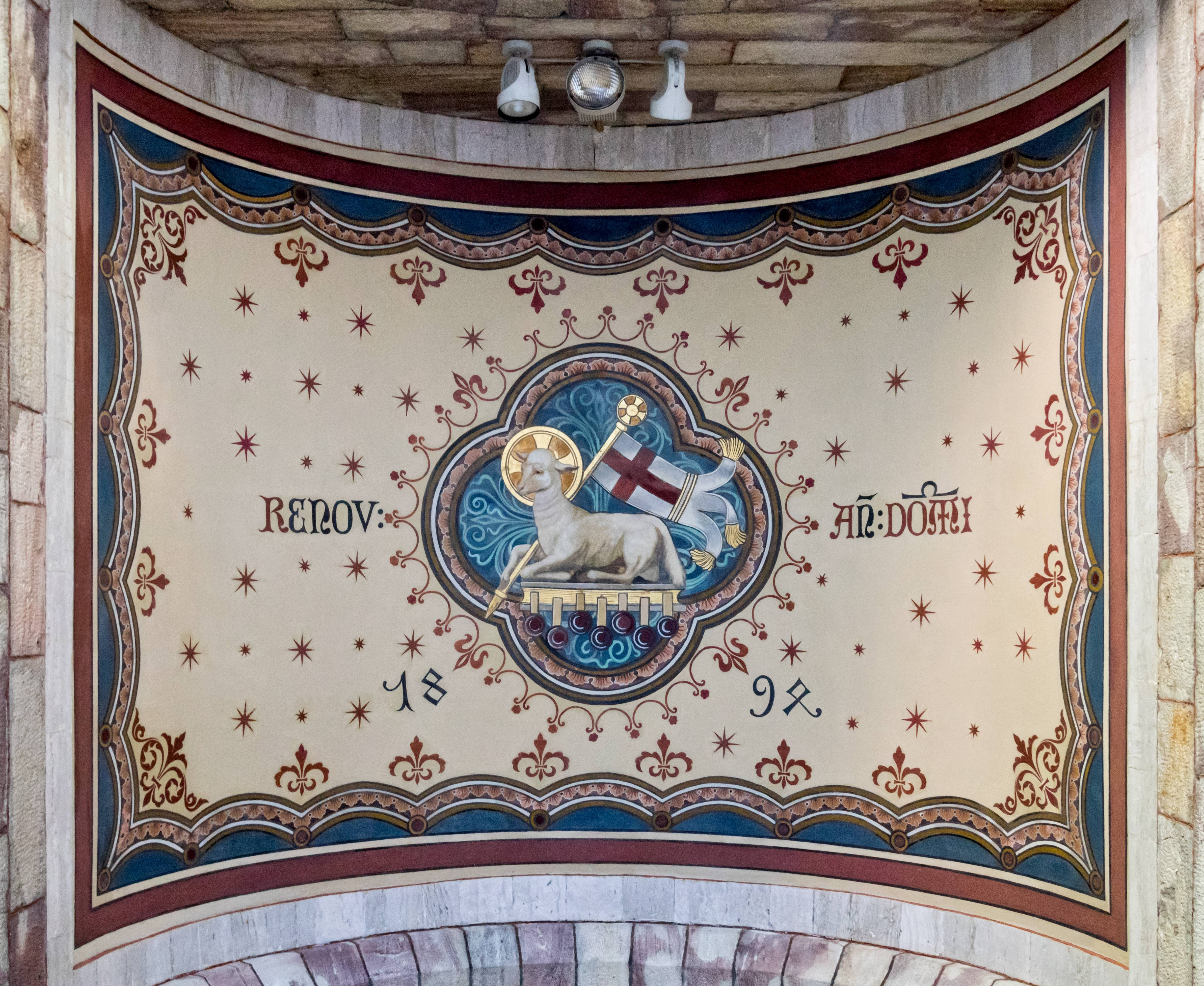 St. Peter und Paul in Bonndorf